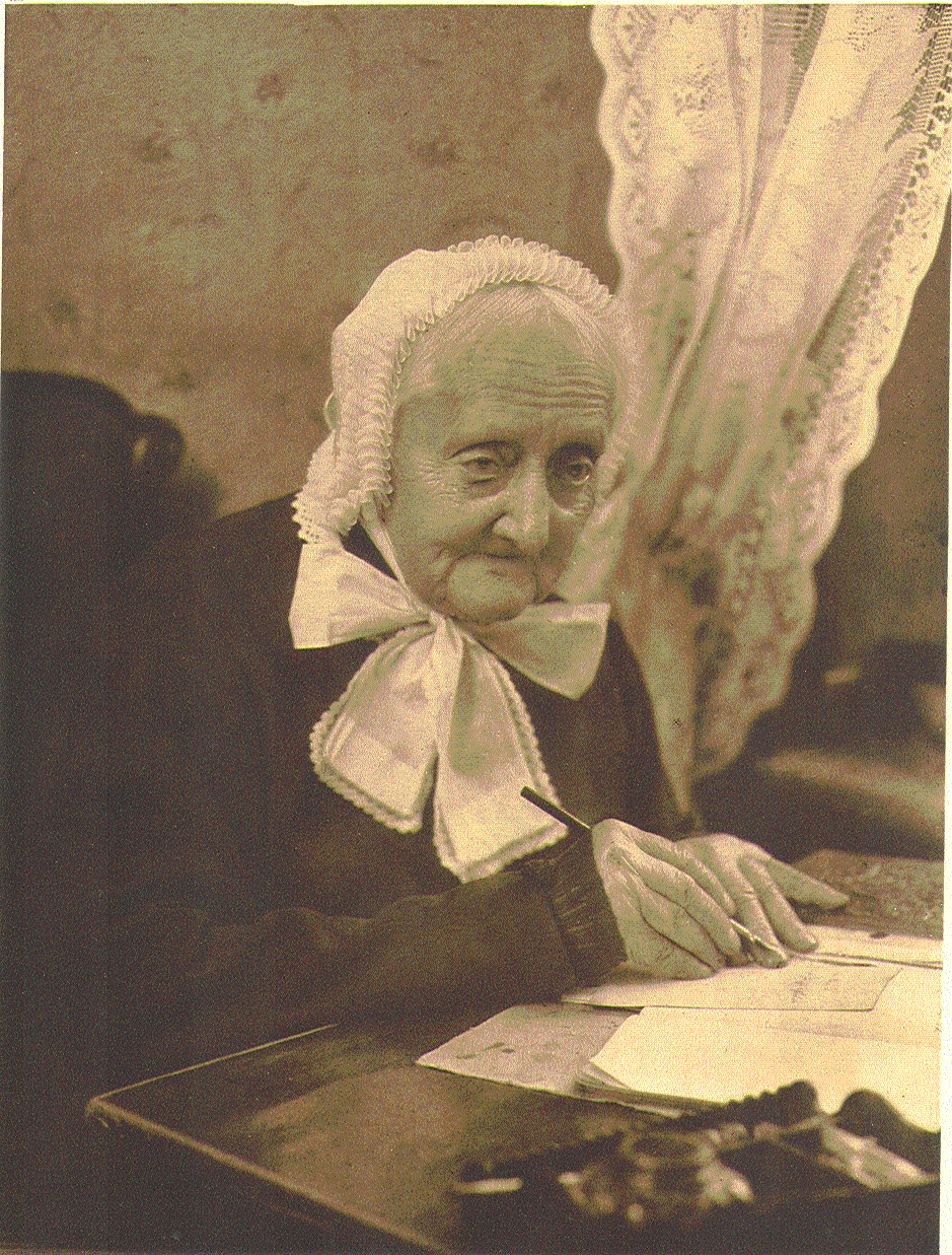 Elise Averdieck, Gründerin der Diakonie